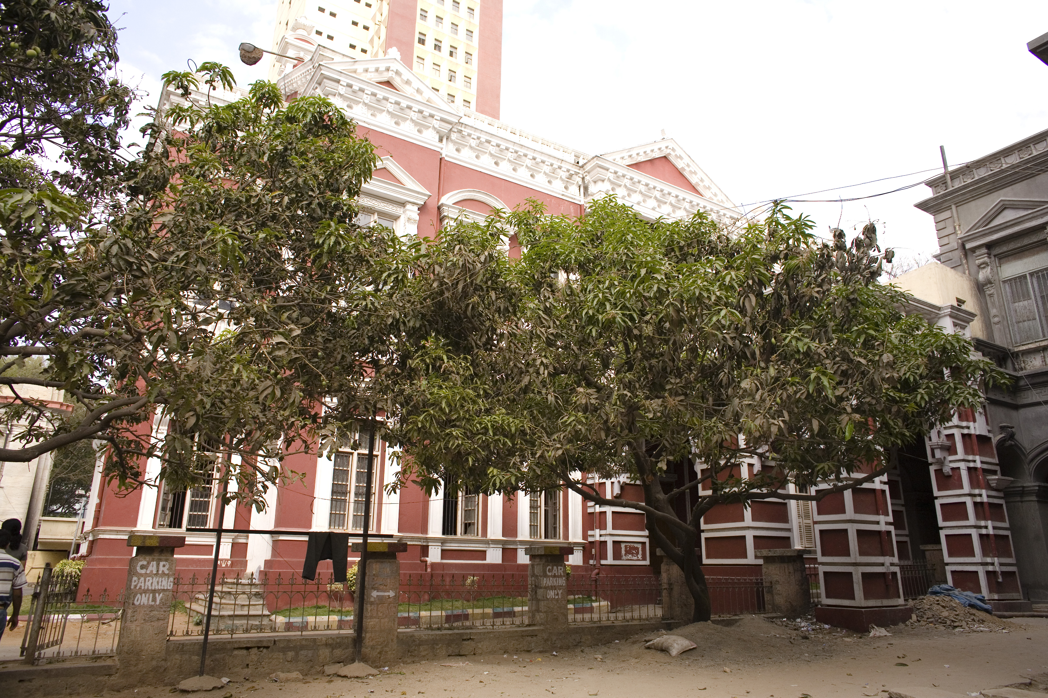 Mayo Hall